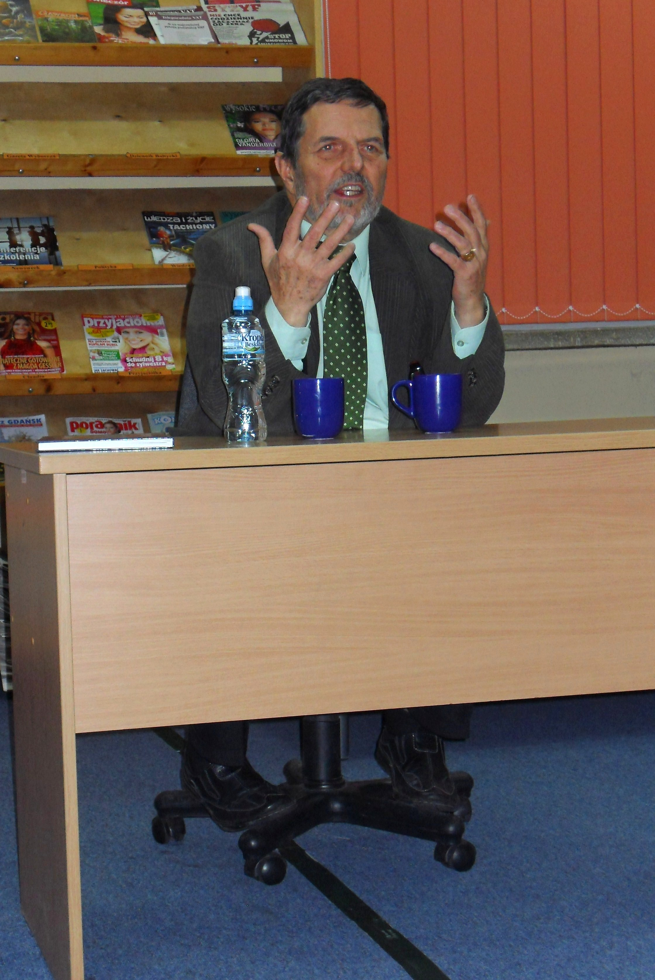 Profesor Jerzy Samp.